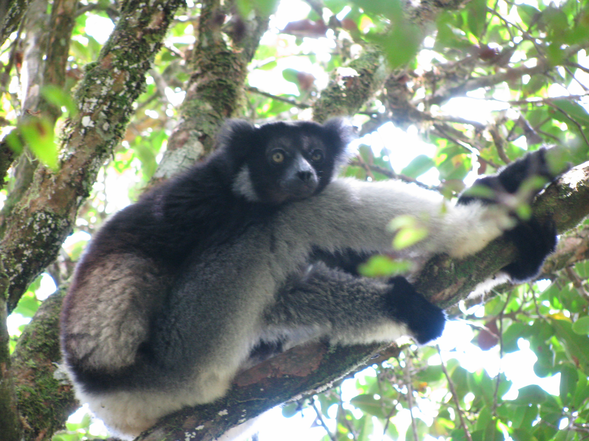 Indri resting after eating, Andasibe-Mantadia National Park, Madagascar